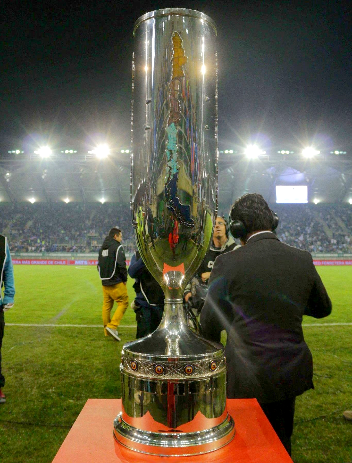 Trofeo que se le otorga al campeón de la competencia chilena.